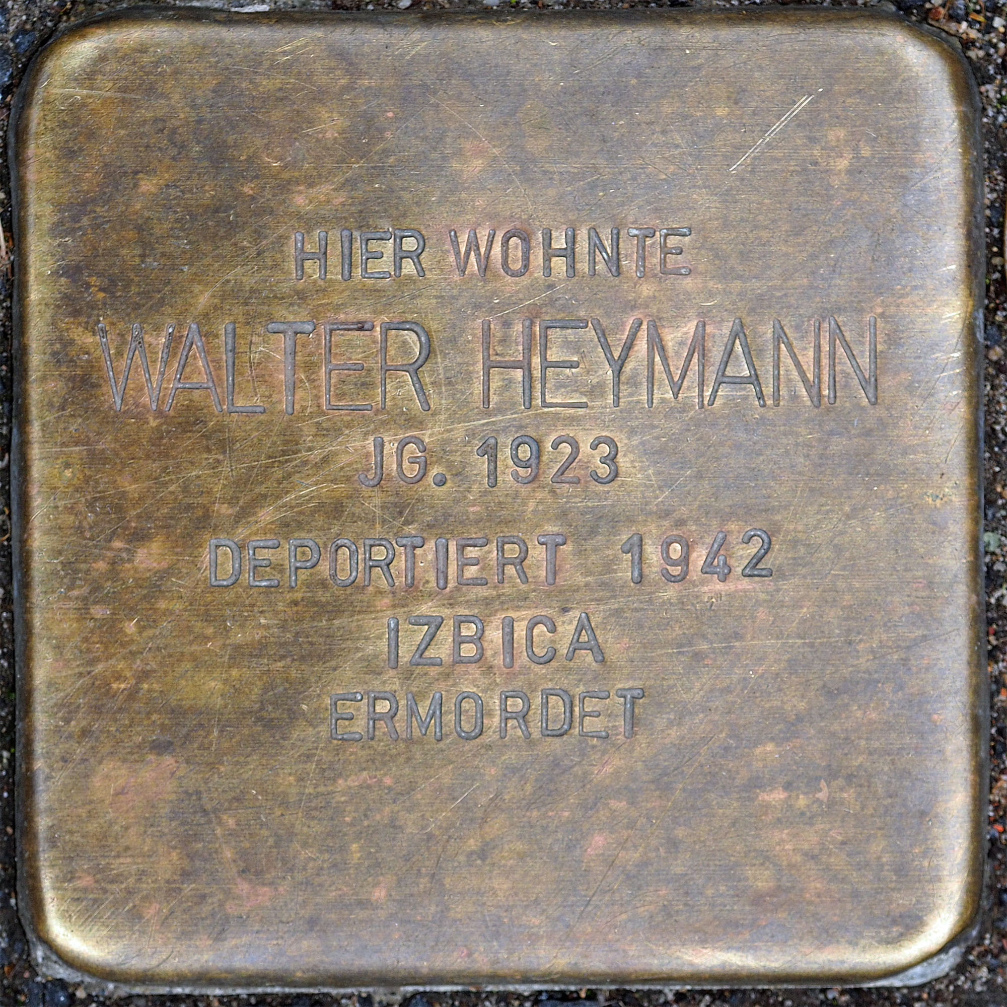 Stolpersteine MG: Heymann, Walter